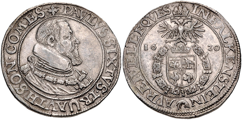 Ansicht eines Trautson-Taler aus der Prägestätte Falkenstein